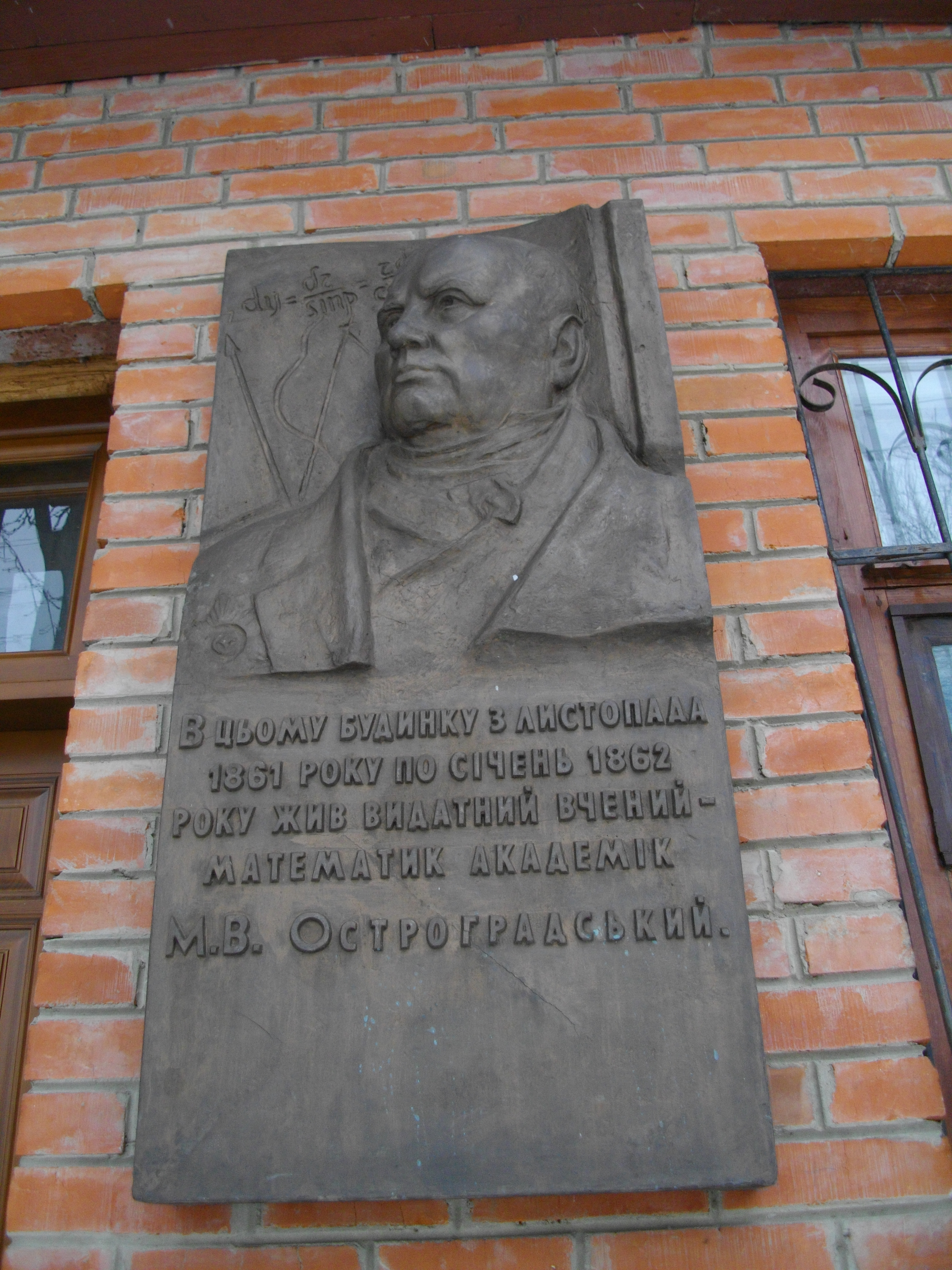 Меморіальна дошка на честь академіка М.В.Остроградського., Полтава, Сковороди вул., 7.